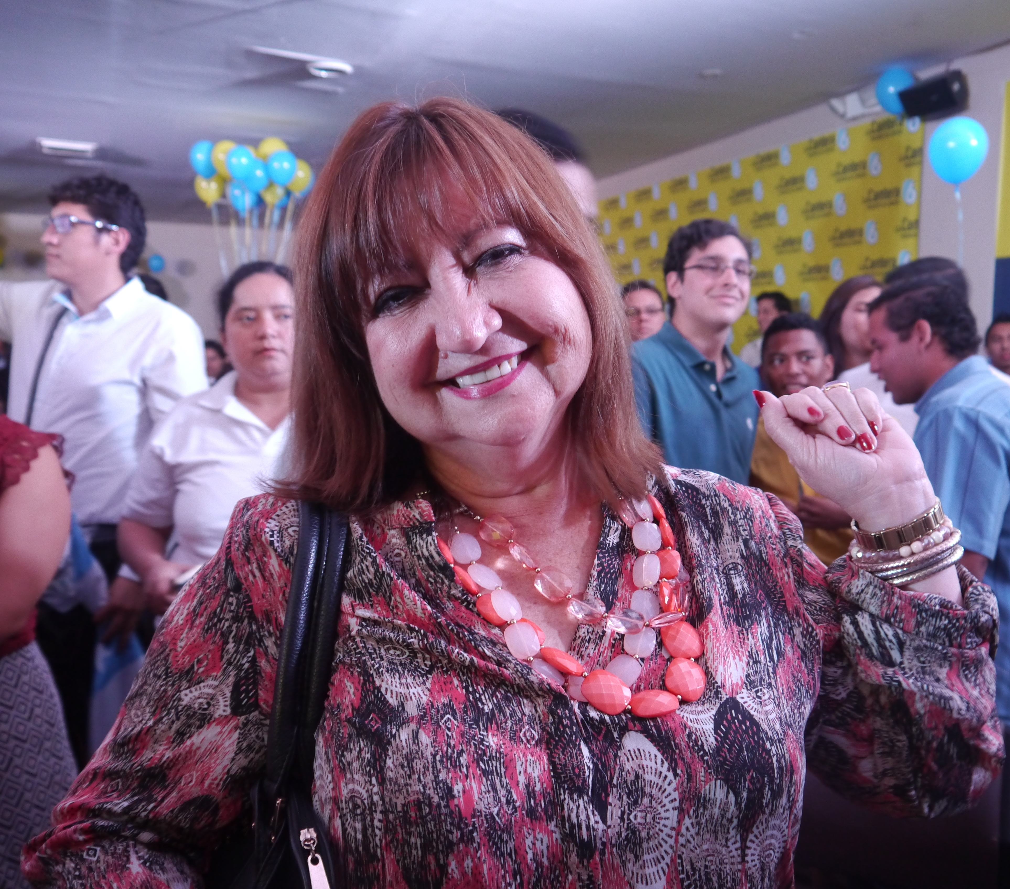 Luzmila Nicolalde en evento de lanzamiento de La Cantera de la 6 en Guayaquil.